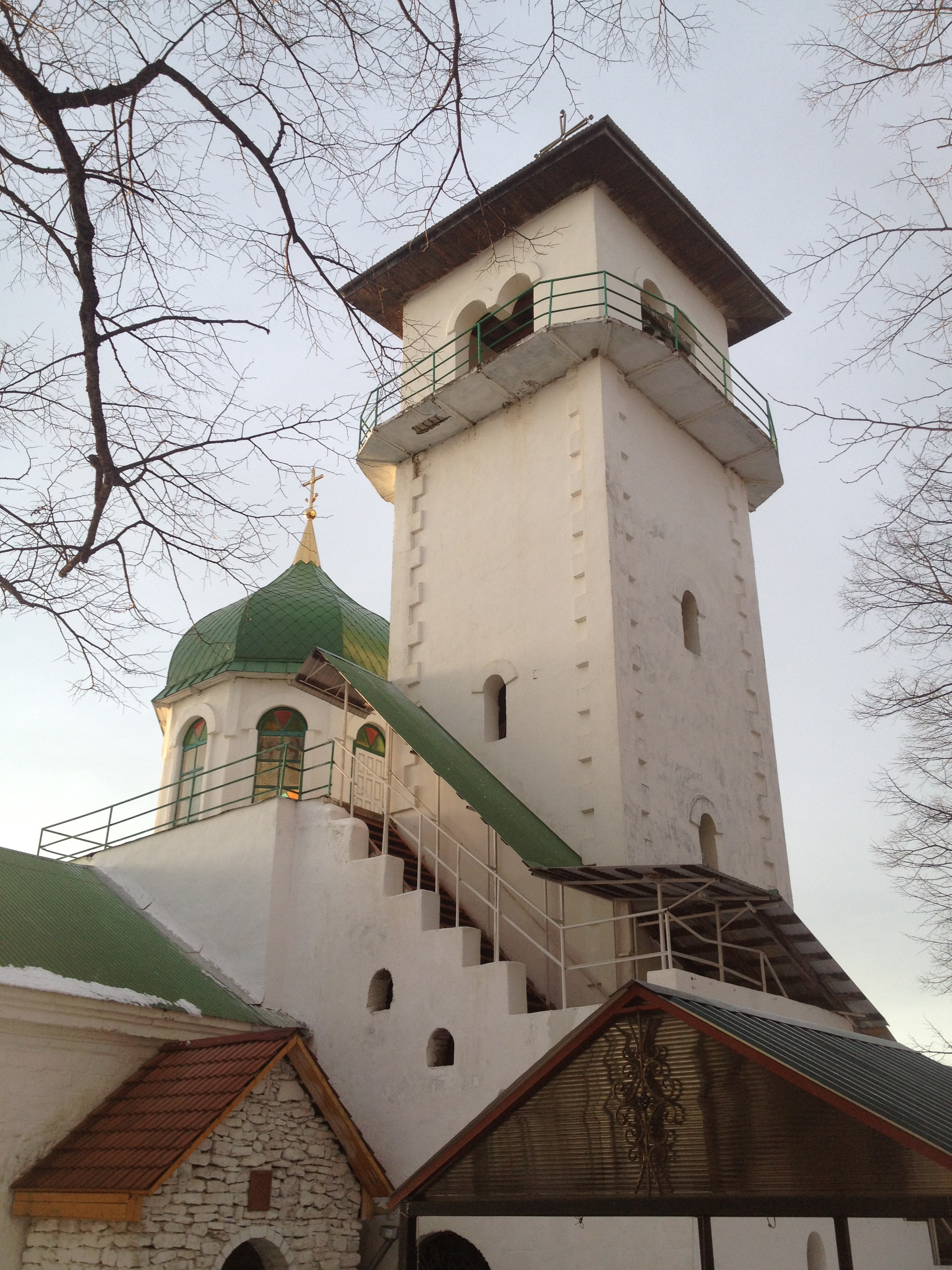 Свято-Михайловский монастырь, колокольня